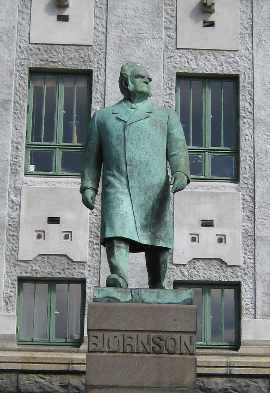 Statue av Bjørnstjerne Bjørnson ved Den Nationale Scene i Bergen.